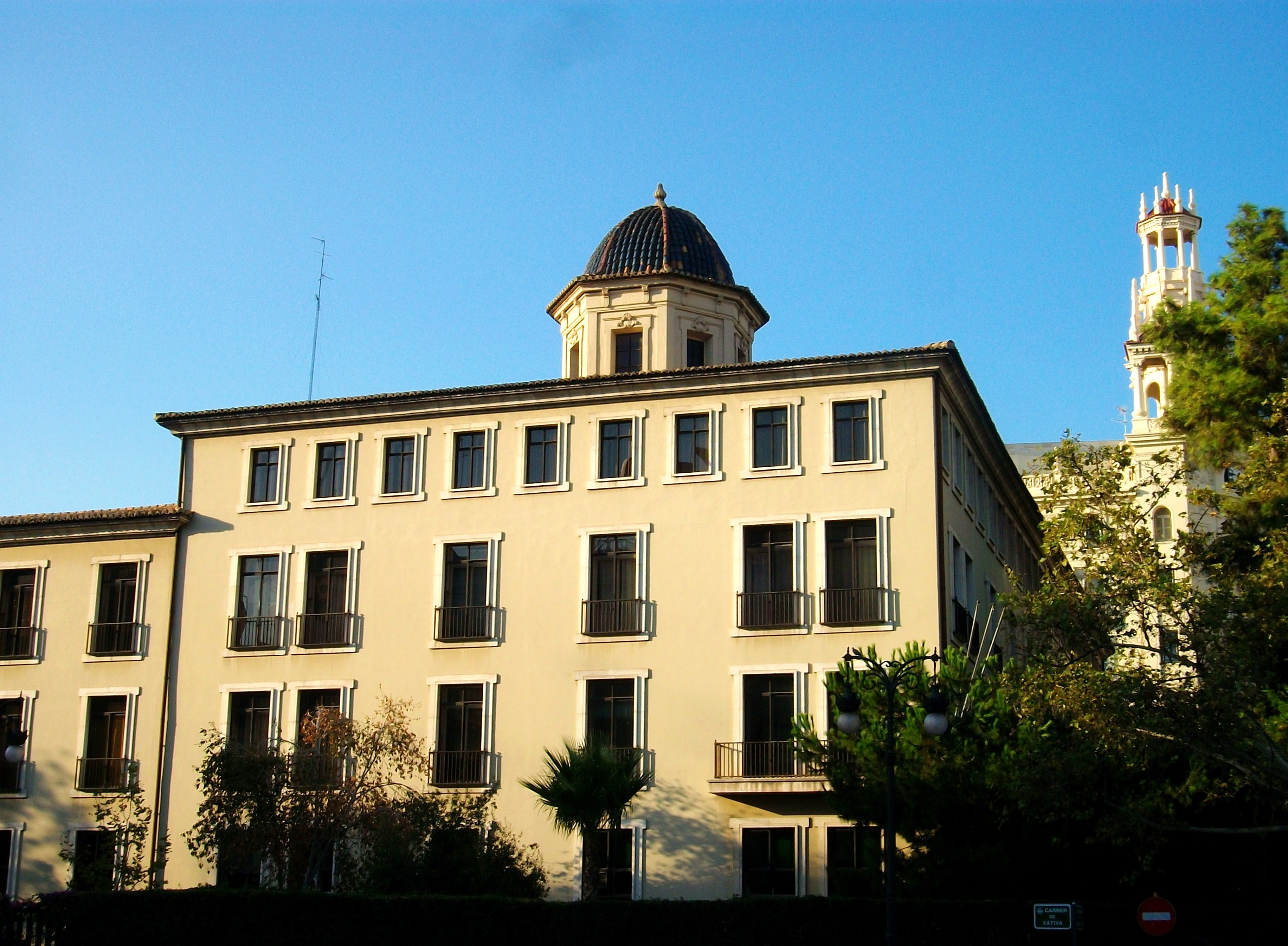 Exterior de l'Institut Lluís Vives de València.